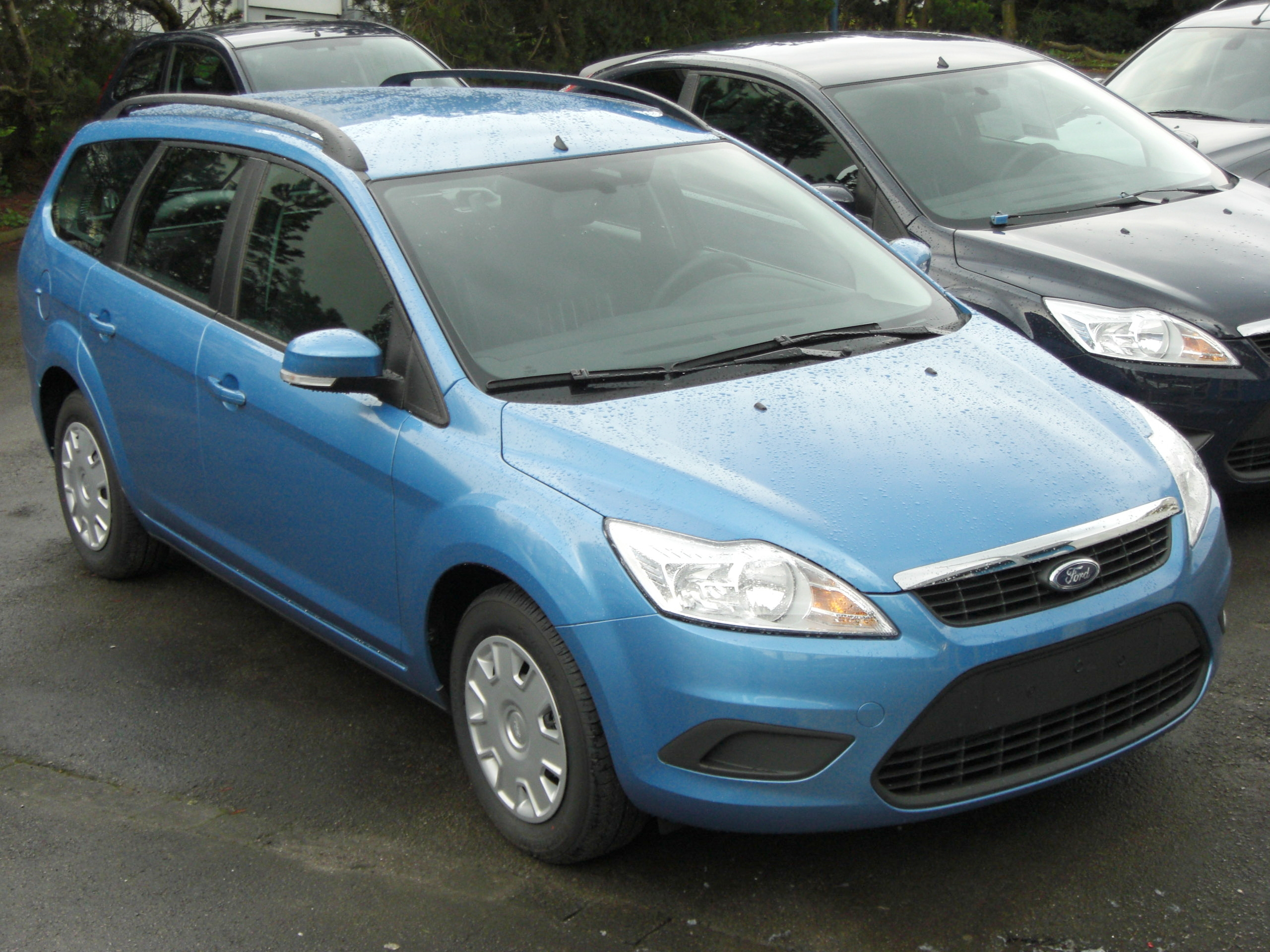 Ford Focus Turnier